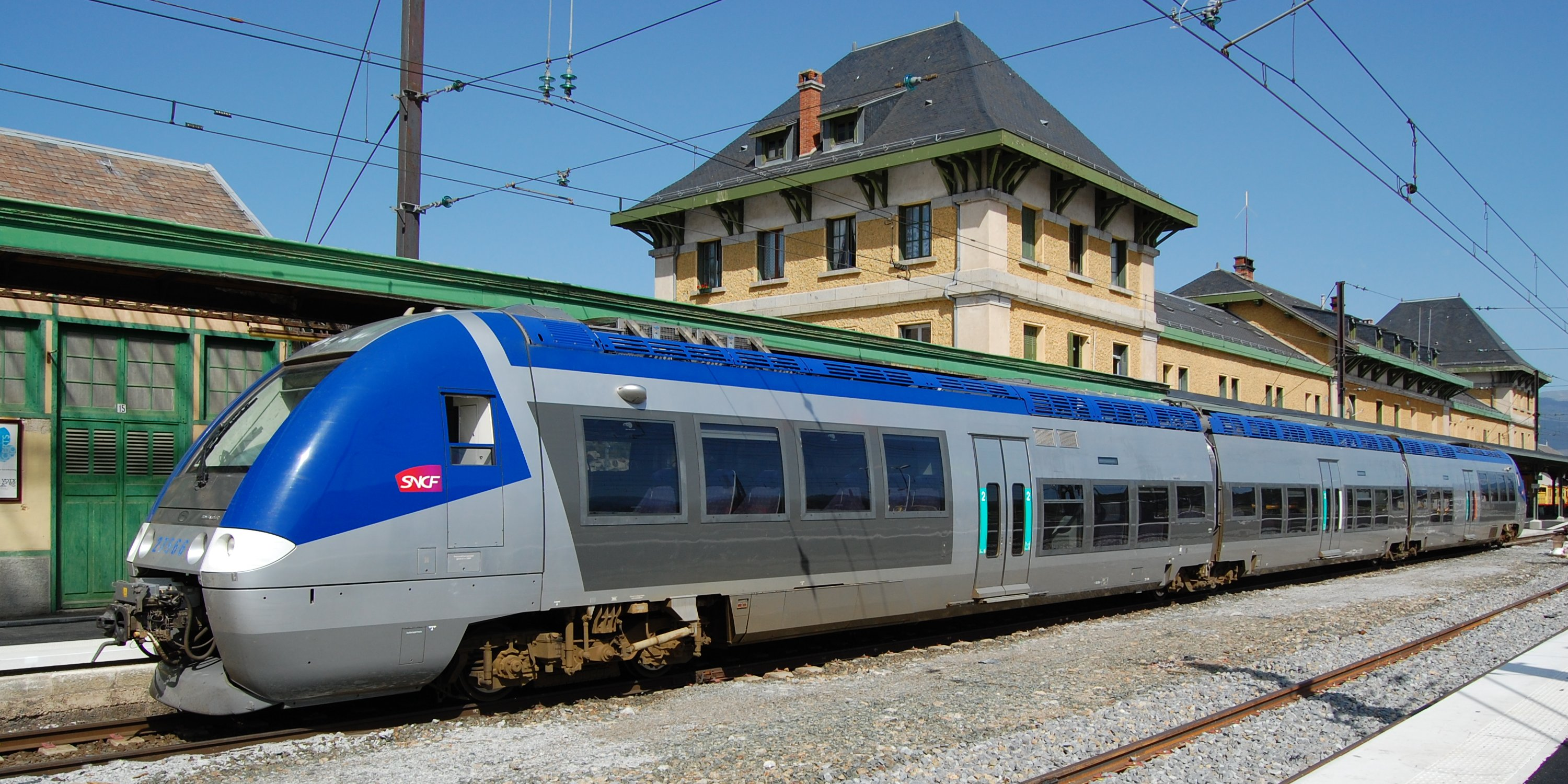 Autorail Grande Capacité (AGC) SNCF Z 27500 stationné en gare de Latour-de-Carol.